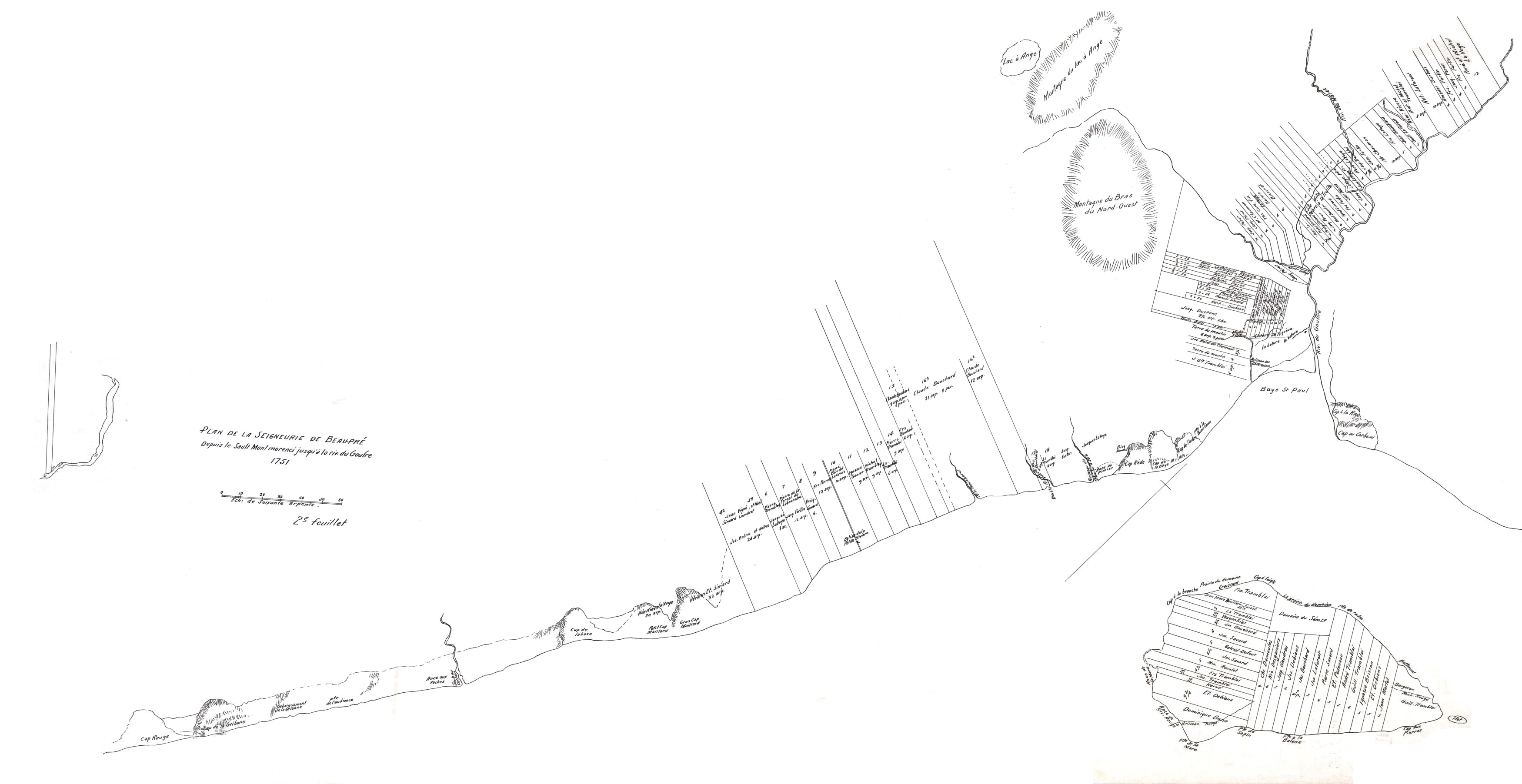 Plan de la seigneurie de Beau-Pré, depuis le Sault Montmorency jusqu'à la rivière du Gouffre - 2e feuillet - 15 arpents : 1 po . - 1751 - 1 plan(s) : manuscrit en noir et blanc ; 63 x 125 cm Sur ce plan de la seigneurie de la Côte-de-Beaupré figurent l'Île aux Coudres, la paroisse de Baie-Saint-Paul, les rivière du Gouffre, Rouge et du Moulin, les caps aux Pierres, Gribane, Rouge, Maillard et aux Corbeaux, les ruisseaux la Vieille Rivière, du Millieu et de la Goudronnerie, le cours d'eau agricole Bouchard-Gauthier, le lieu-dit Sault-au-Cochon, le lac de l'Ange, la pointe des Roches ou Cap à l'Aigle, le relief, la dimension des lots, l'église, les battures, les anses, le moulin à scie, les îles, le réseau hydrographique, les toponymes français et 112 noms de propriétaires.